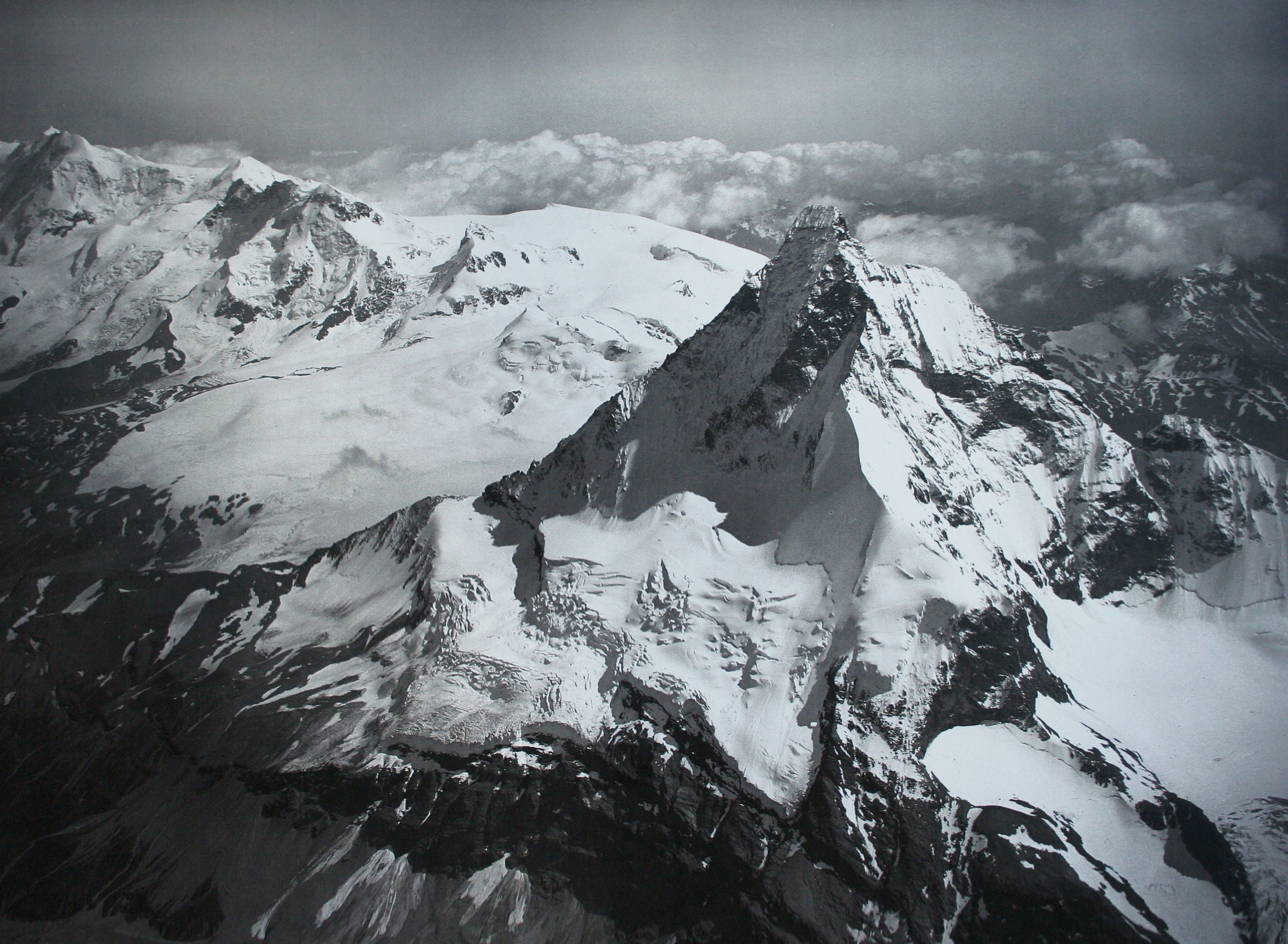 Matterhorn von Nordwesten, 12. August 1910